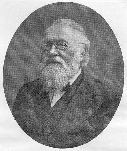 Franz Bücheler (1837–1908), deutscher klassischer Philologe. Originalphotographie.